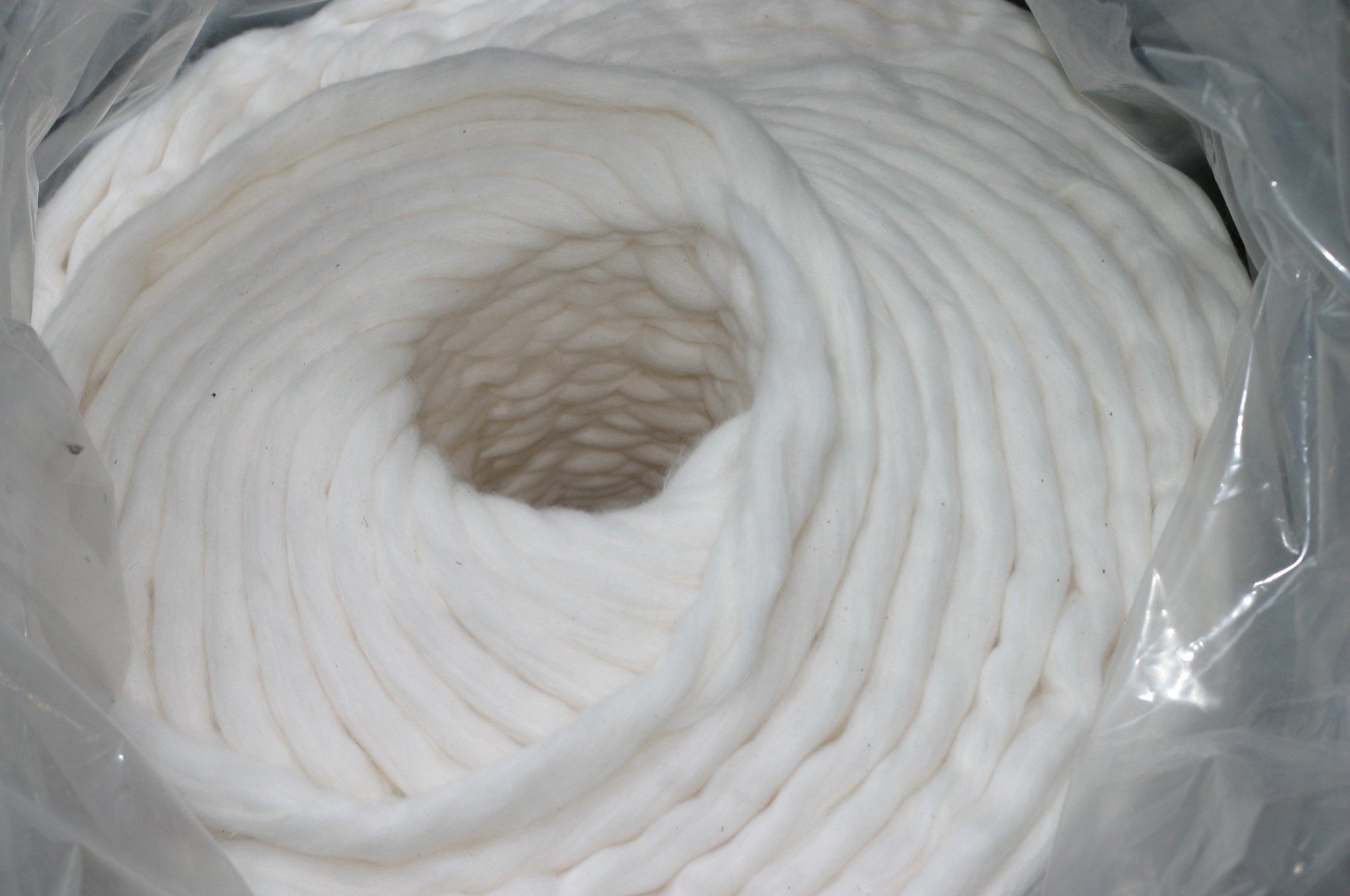 Ein Streckenband aus Baumwolle in der Verpackung eines Plastiksackes. Man beachte, wie das Band in Schleifen abgelegt wurde.